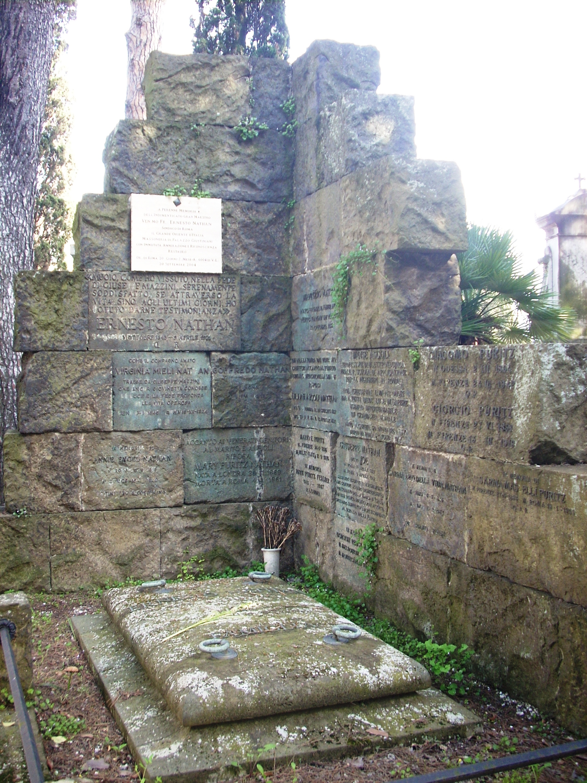 Particolare della tomba di Ernesto Nathan al Cimitero del Verano (Roma)